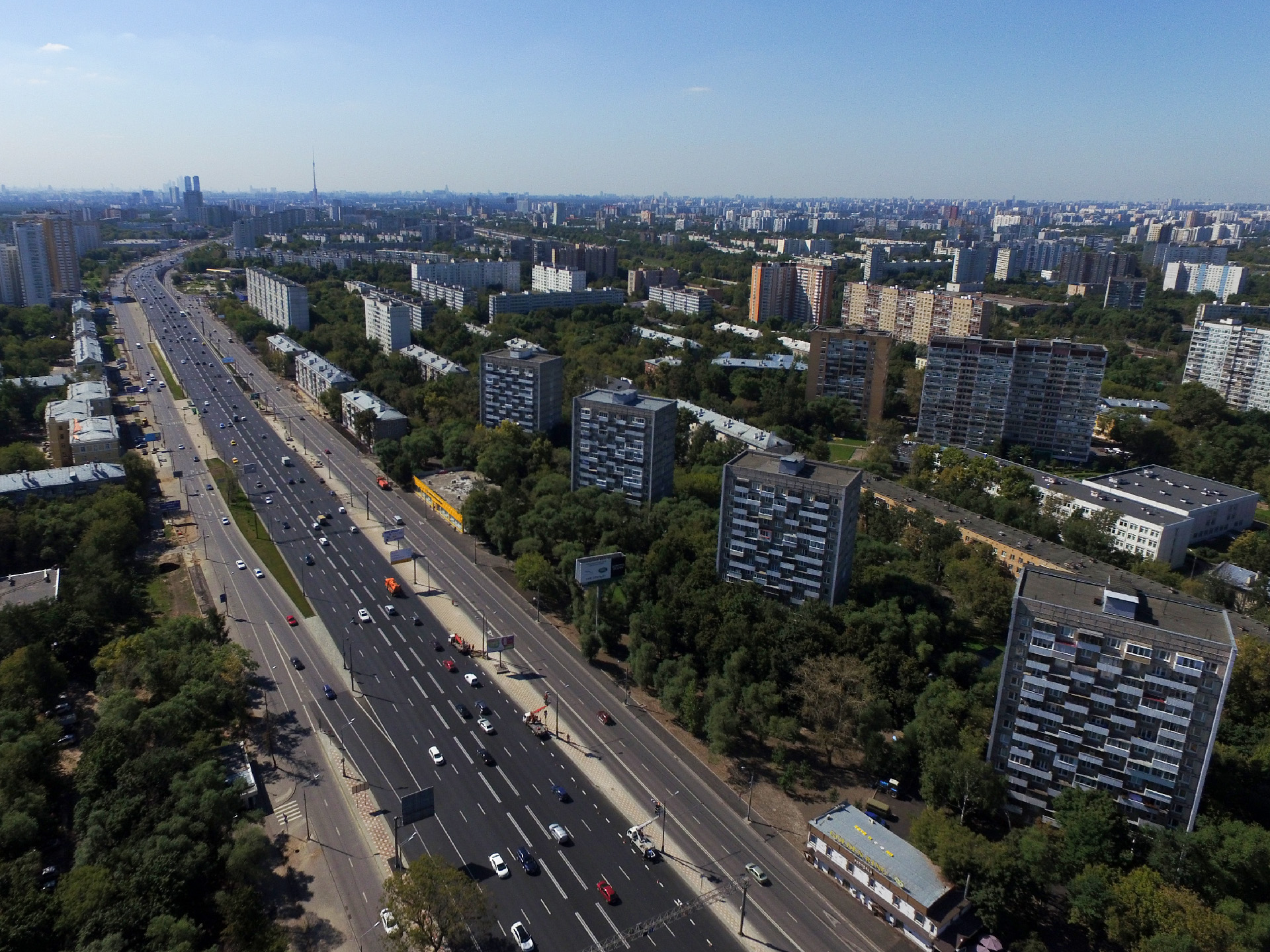 Ярославское шоссе с дублером, вид со стороны МКАД в августе 2015.